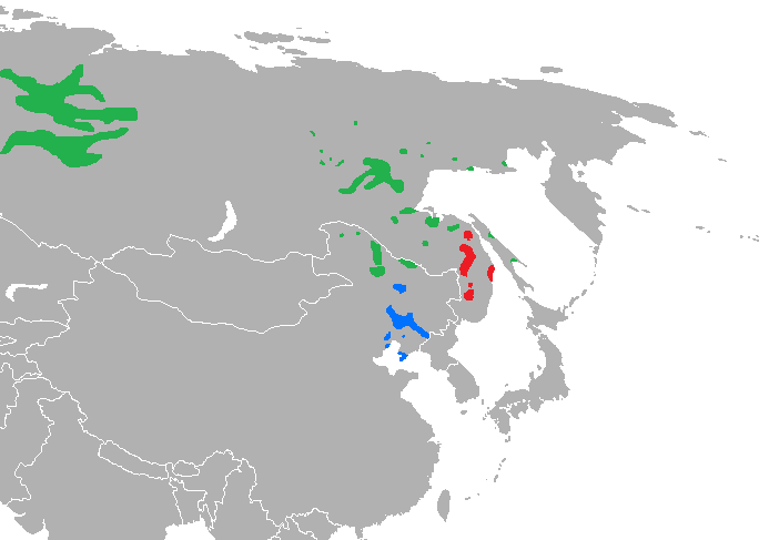 Ramas de las lenguas tunguses Septentrional (Tungus) Suroriental (Amur) Suroccidental (Mandschu)